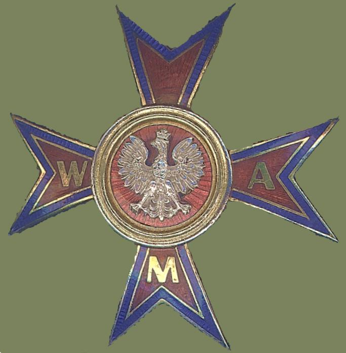 Odznaka absolwenta Wojskowej Akademii Medycznej, noszona na kieszeni kurtki mundurowej, wzór 1992 (krzyż maltański)